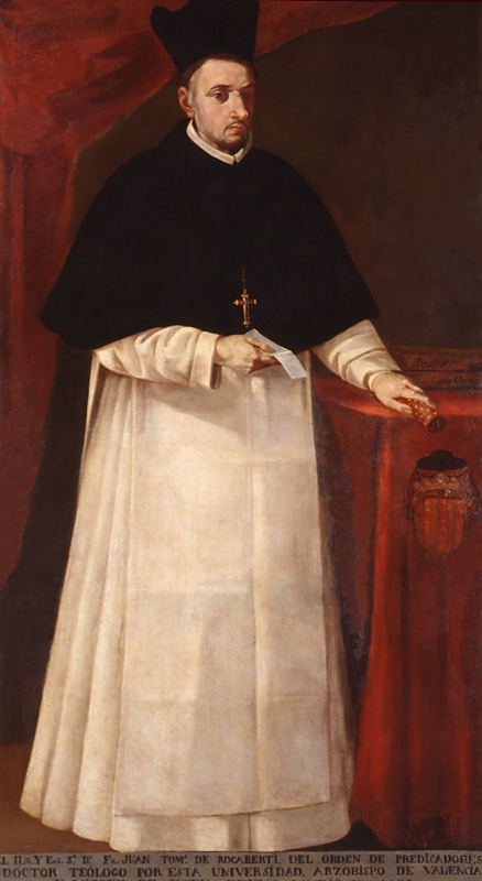 Retrato del eclesiástico español Juan Tomás de Rocabertí (1627-1699), que fue arzobispo y virrey de Valencia, maestro general de la Orden de Predicadores e inquisidor general de España.